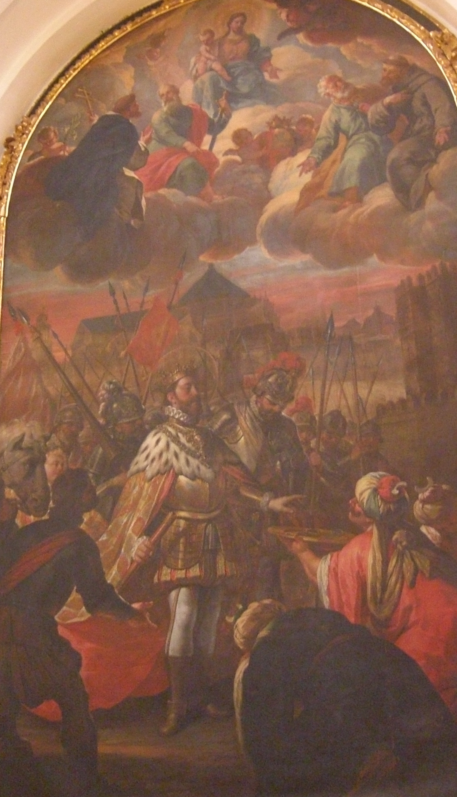 La conquista de Córdoba por Fernando III el Santo, de Antonio Palomino. Capilla de Santa Teresa de la Mezquita de Córdoba (España).